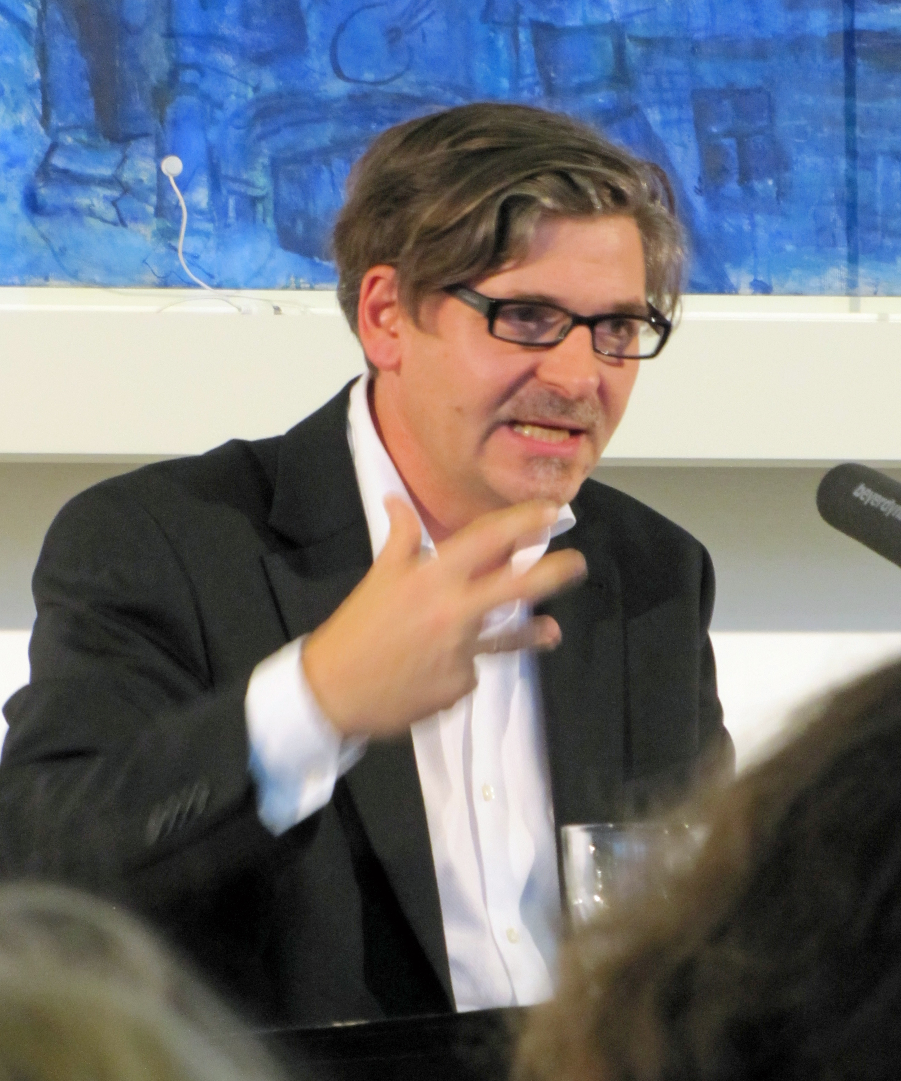 Jan-Werner Müller, deutscher Politikwissenschaftler, Dozent und Autor. Oktober 2013 in Frankfurt am Main bei den Römerberggesprächen.